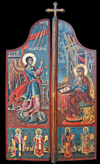 Царски двери от Свети Димитър в Охрид.